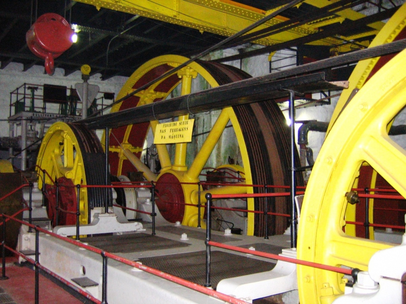 Máquina fixa do 5º Plano Inclinado